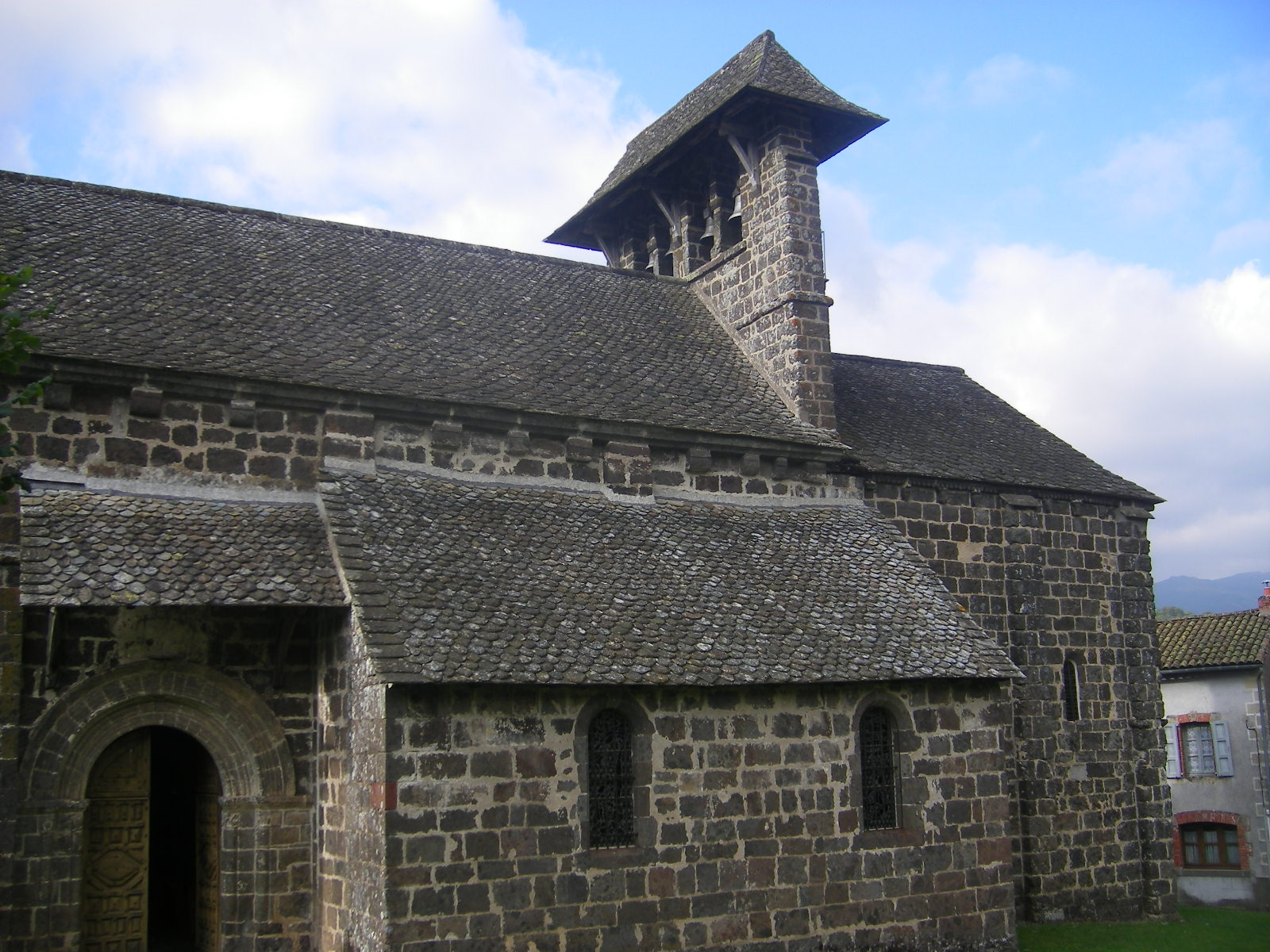 Lascelle